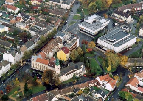 Nagykanizsa, Hungary, aerialphotography